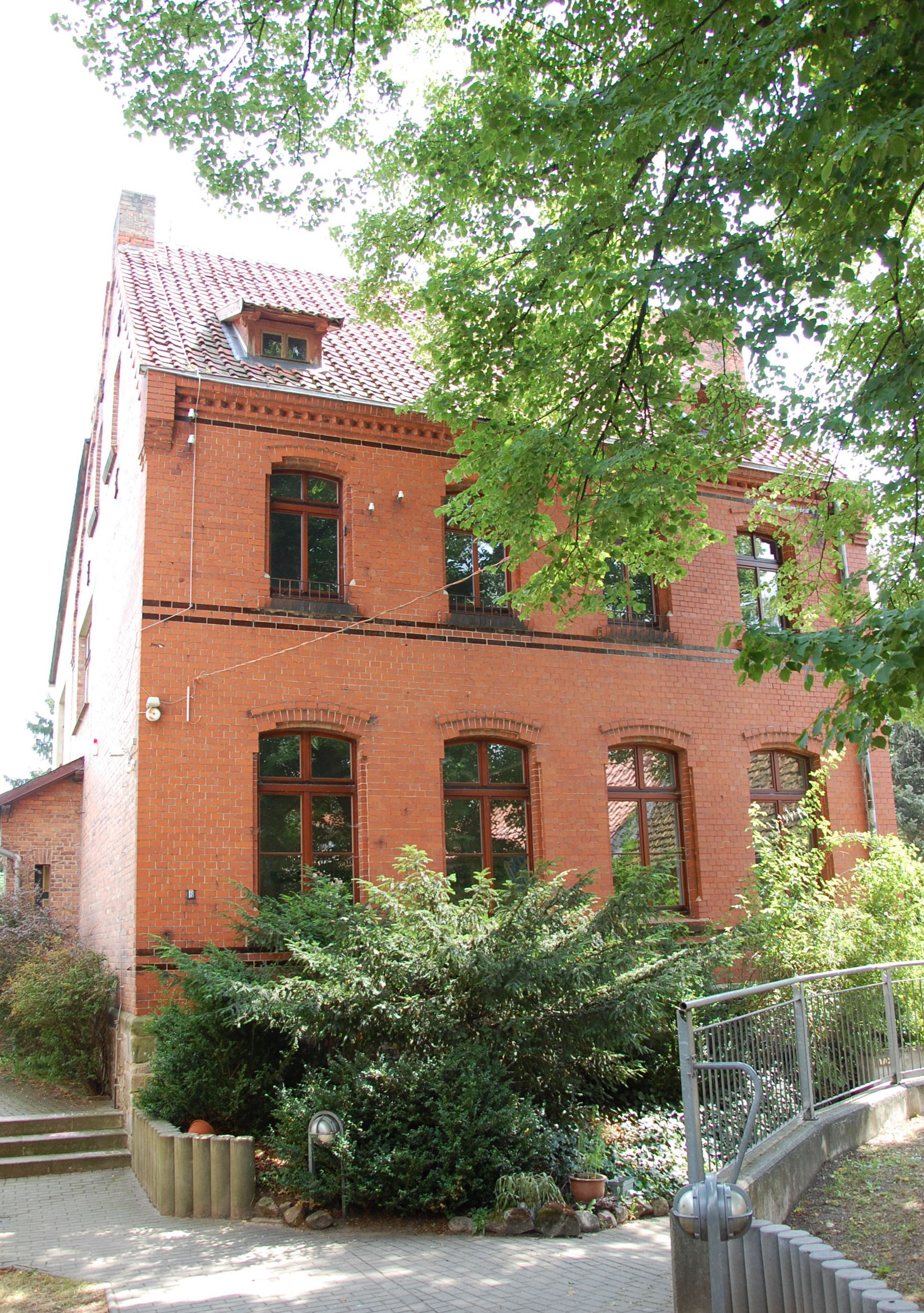 Haus Schulstraße 18 in Bad Suderode